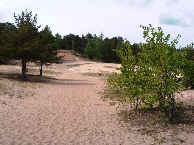 Sütiste parkmets. Lamekas (Rahumäe kalmistust põhjapool lame nõlv)